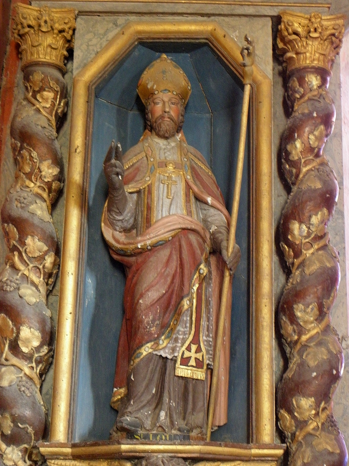 Église Saint-Loup du Lou-du-Lac (35). Intérieur. Retable du maître-autel. Statue de Saint-Loup.